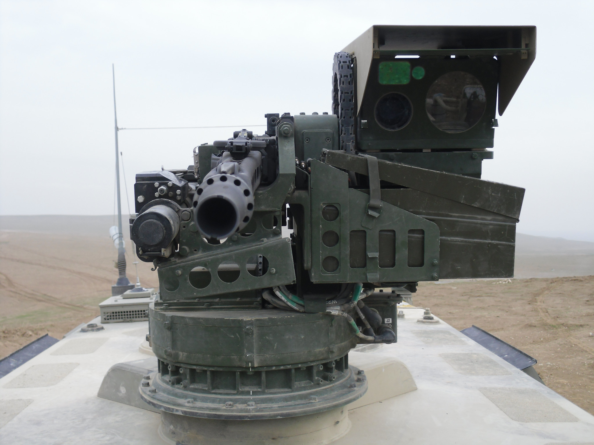 FLW100 mit MG3 auf Dingo im November 2011, Afghanistan